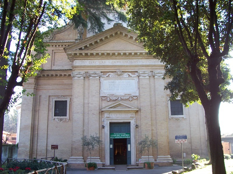 Roma - Chiesa di S. Paolo alle Tre Fontane